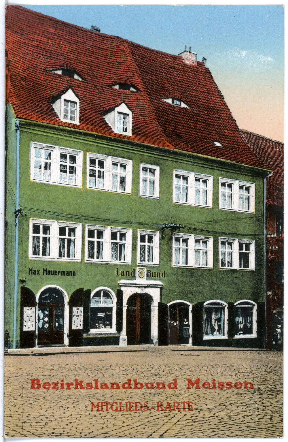 Meißen; Bezirkslandbund, Mitgliedskarte This postcard is from publisher Brück & Sohn in Meißen ( postcard has a unique number 22112 and is available in a higher resolution at the publisher. This images was uploaded in a cooperation project between Wikipedians and the publisher.